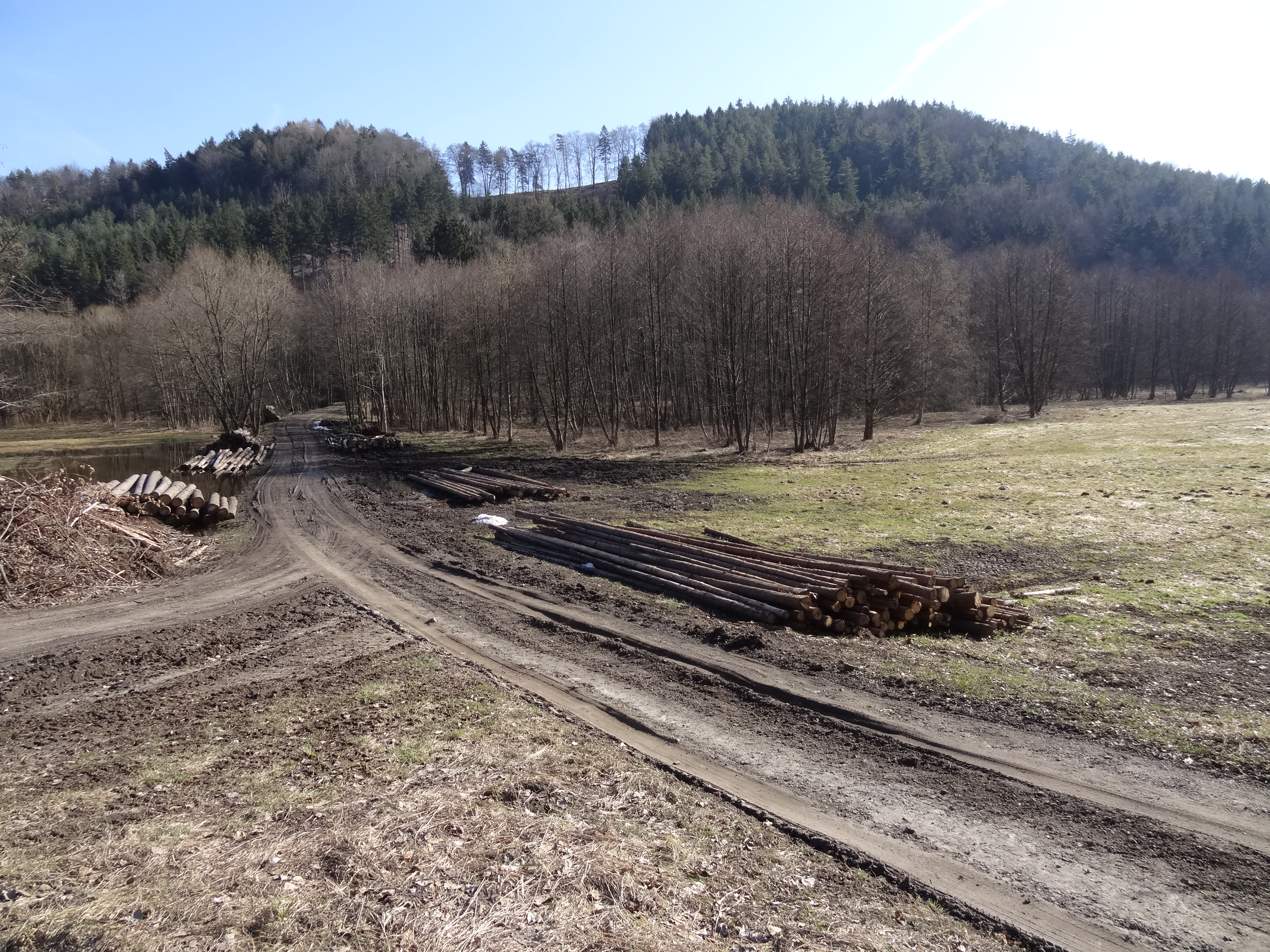 Údolí Mohelky u osady Slavíkov